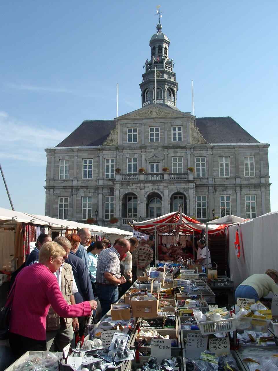 De Maart zu Maastricht